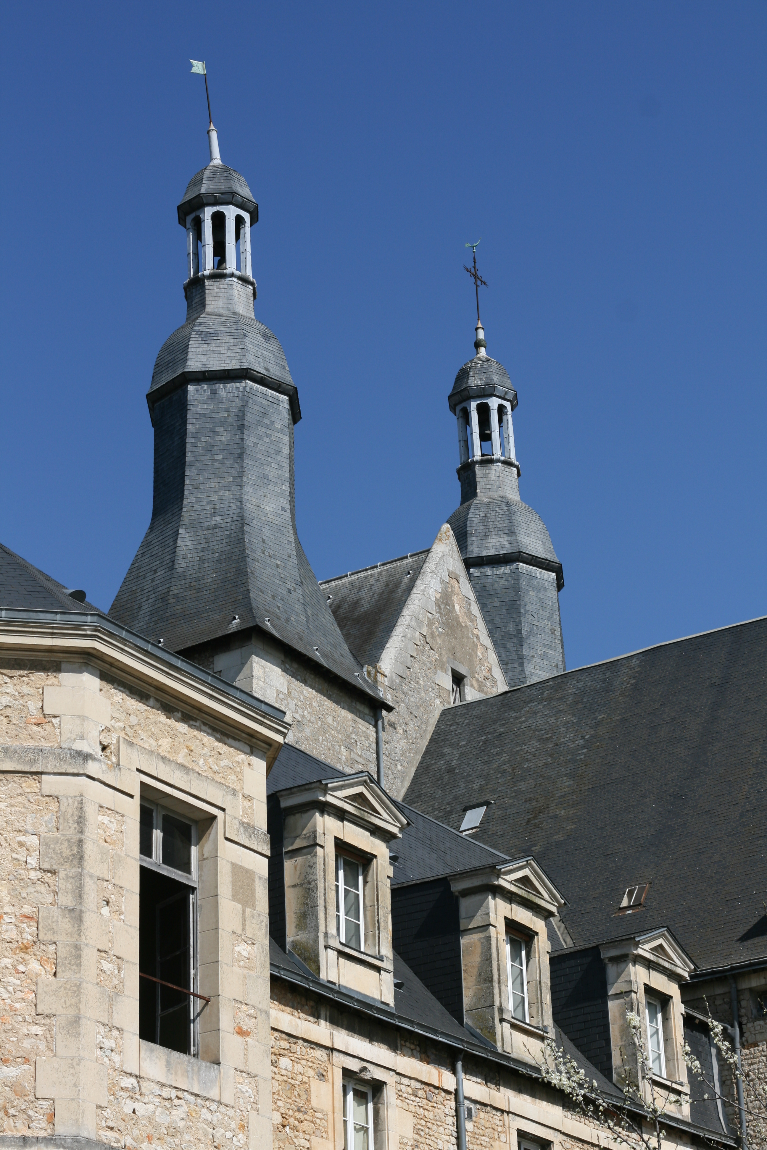 architecture, clocher